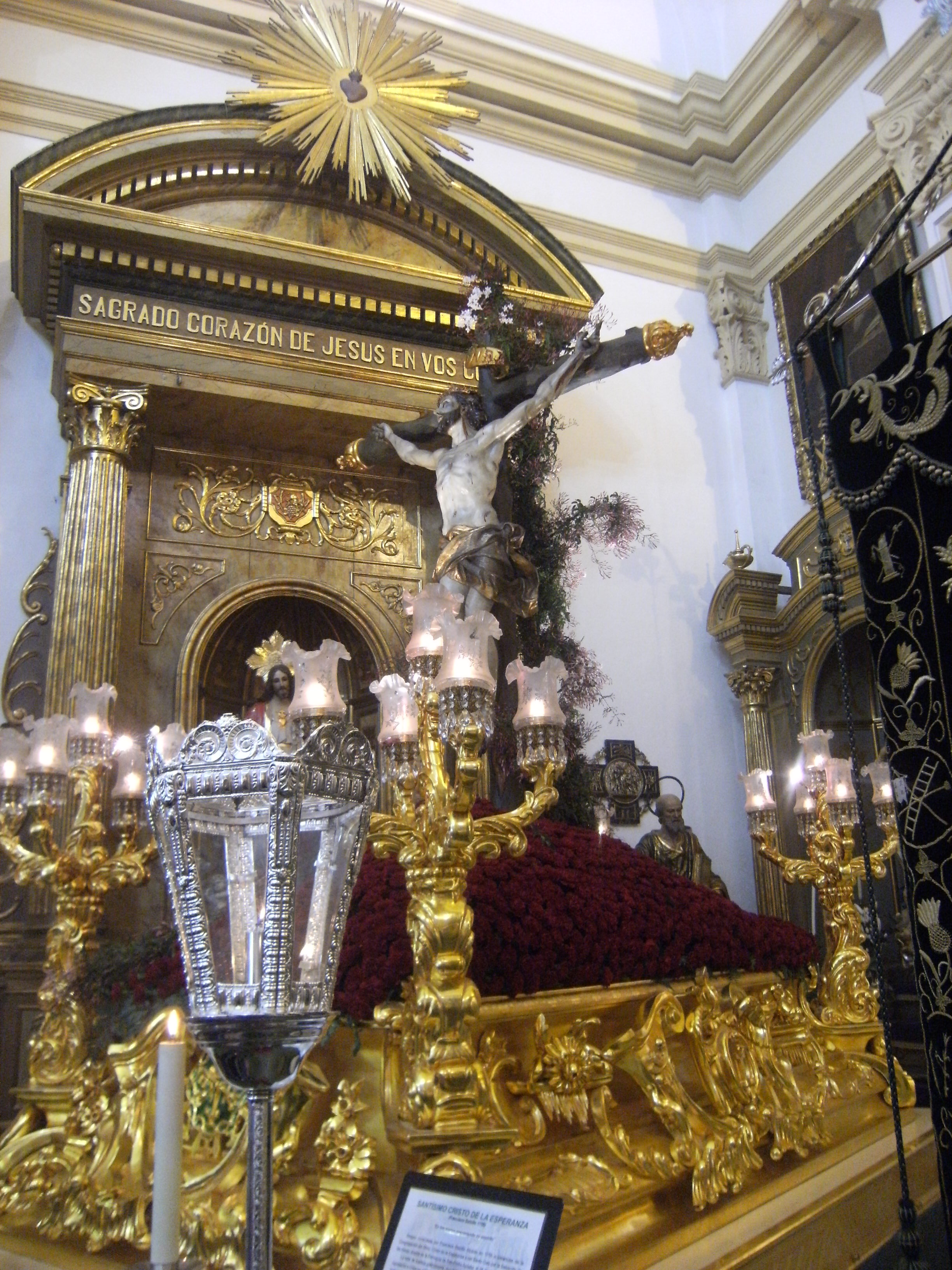 Imagen del trono del Santísimo Cristo de la Esperanza, crucificado tallado por Francisco Salzillo en 1755, titular de la Cofradía del mismo nombre, en Murcia (Región de Murcia, España)